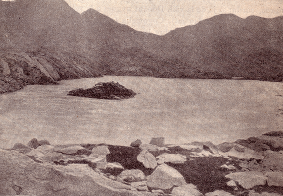 Fotografia de vers el 1910 de l'Estany Tort (la Torre de Cabdella, Pallars Jussà)